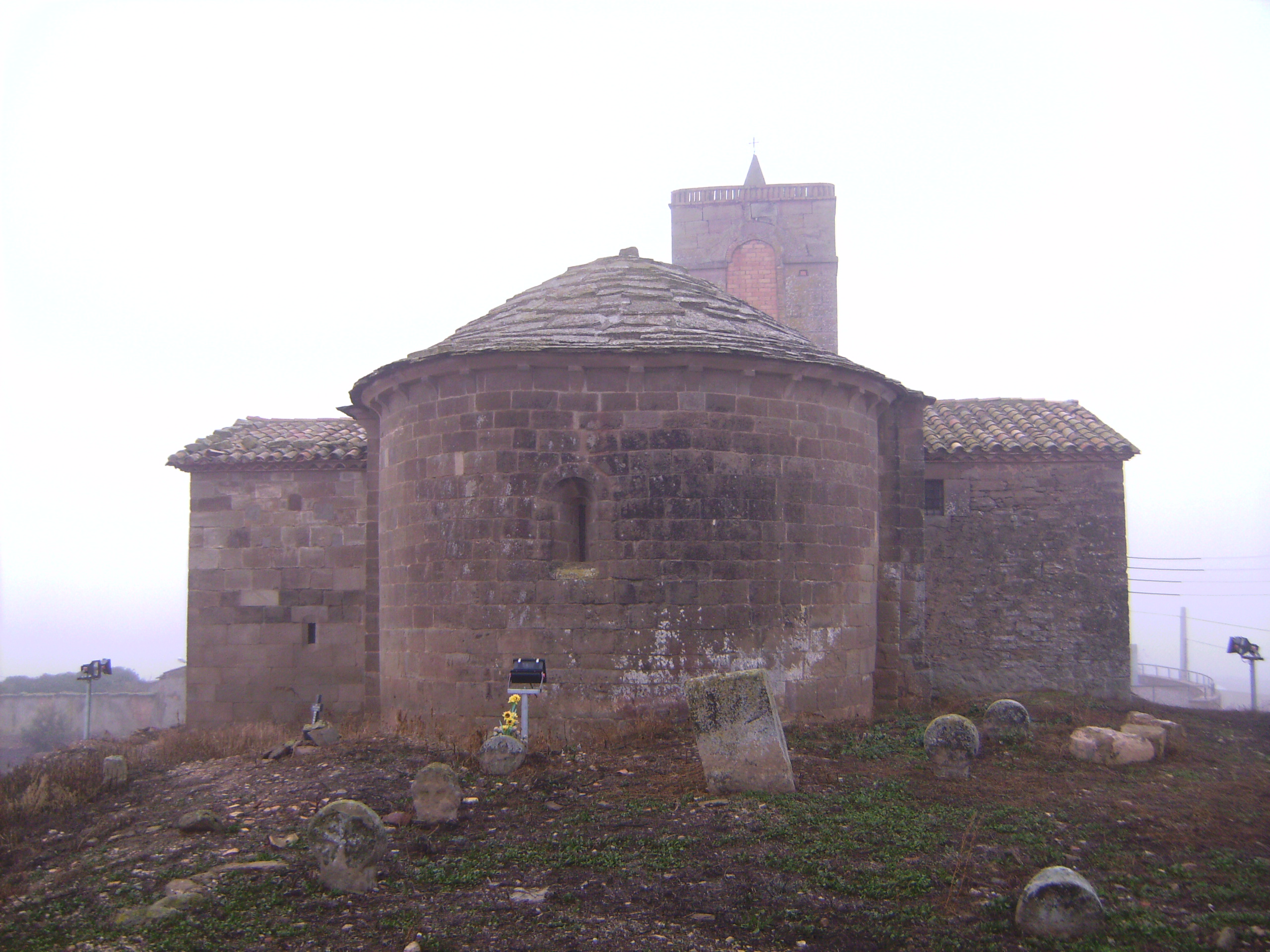 Pelagalls - Iglesia de Sant Esteve (Abside)